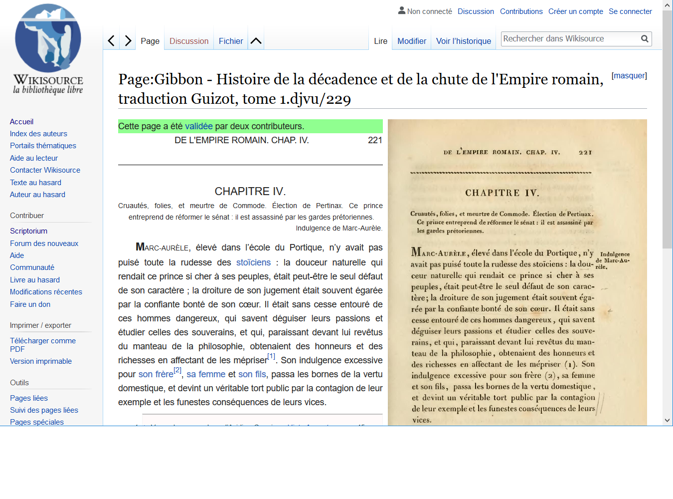 Capture d'écran d'une page de l'Histoire de la décadence et de la chute de l'Empire romain sur Wikisource en mode Page.